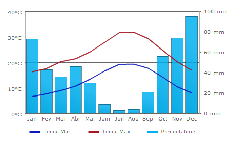 Climat Huelva - Andalousie- Espagne